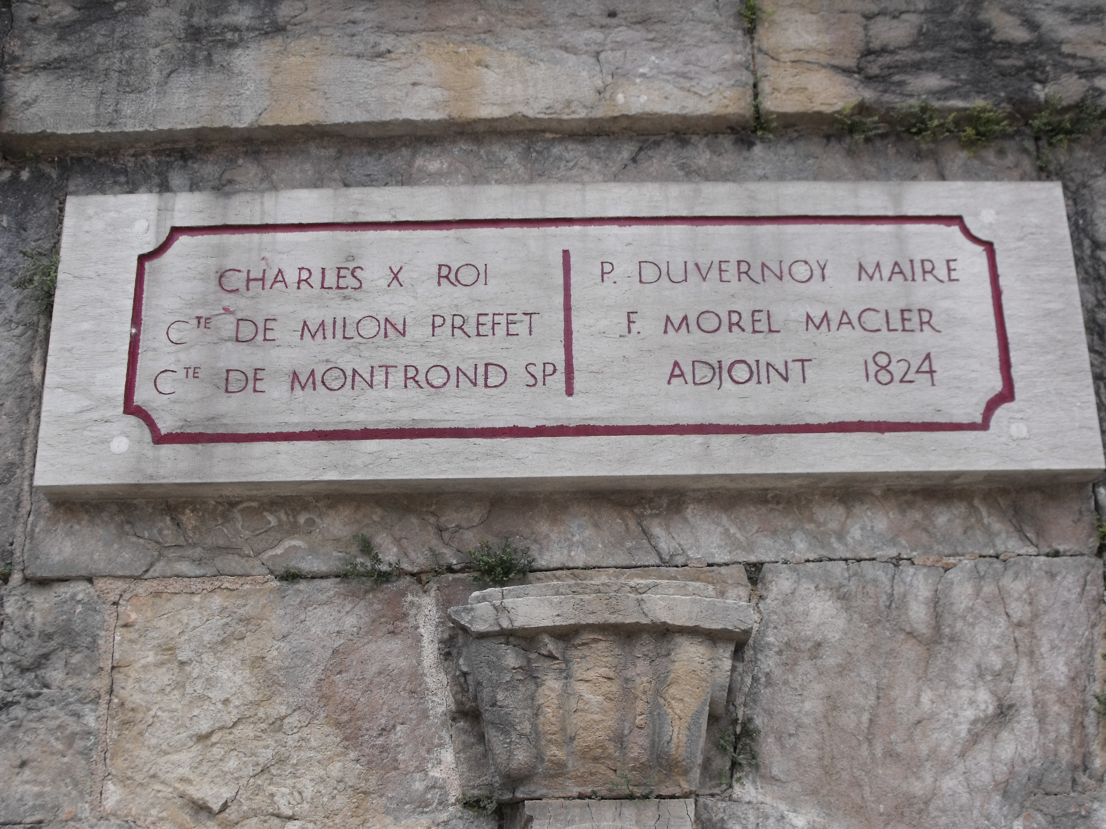 Fontaine de Sainte-Marie (Inscrit) .